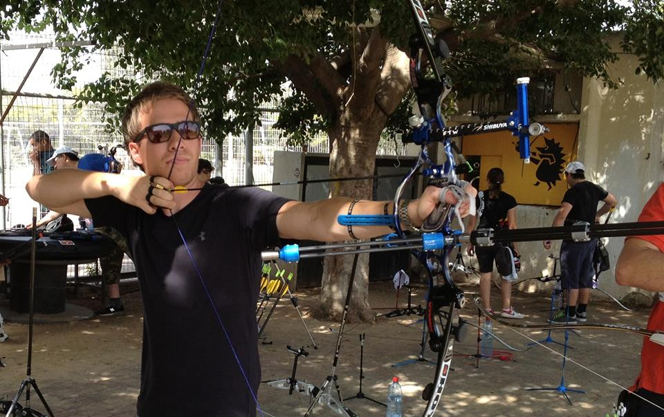 גיא מצקין